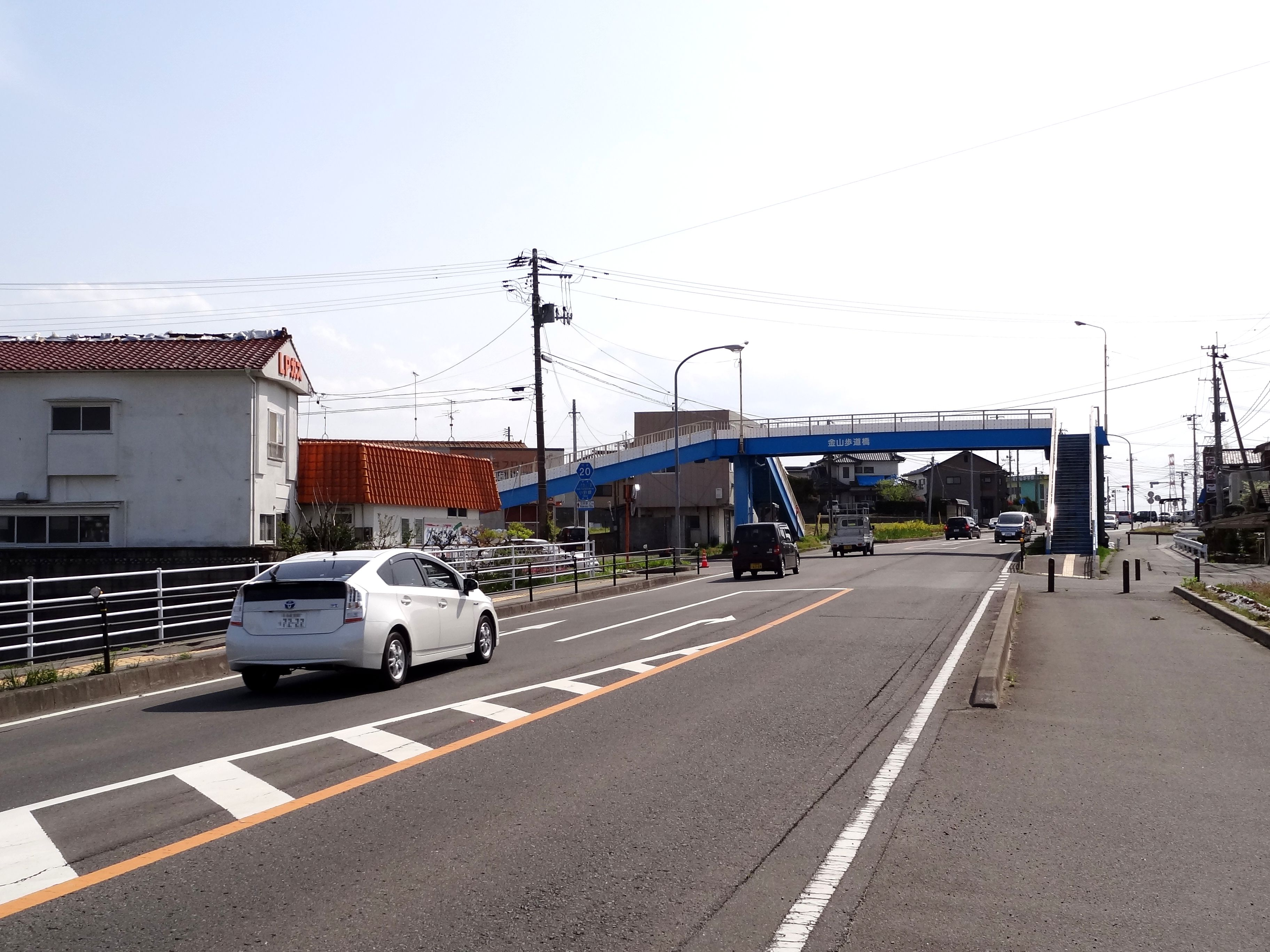 福島県道20号いわき上三坂小野線 いわき市金山町付近